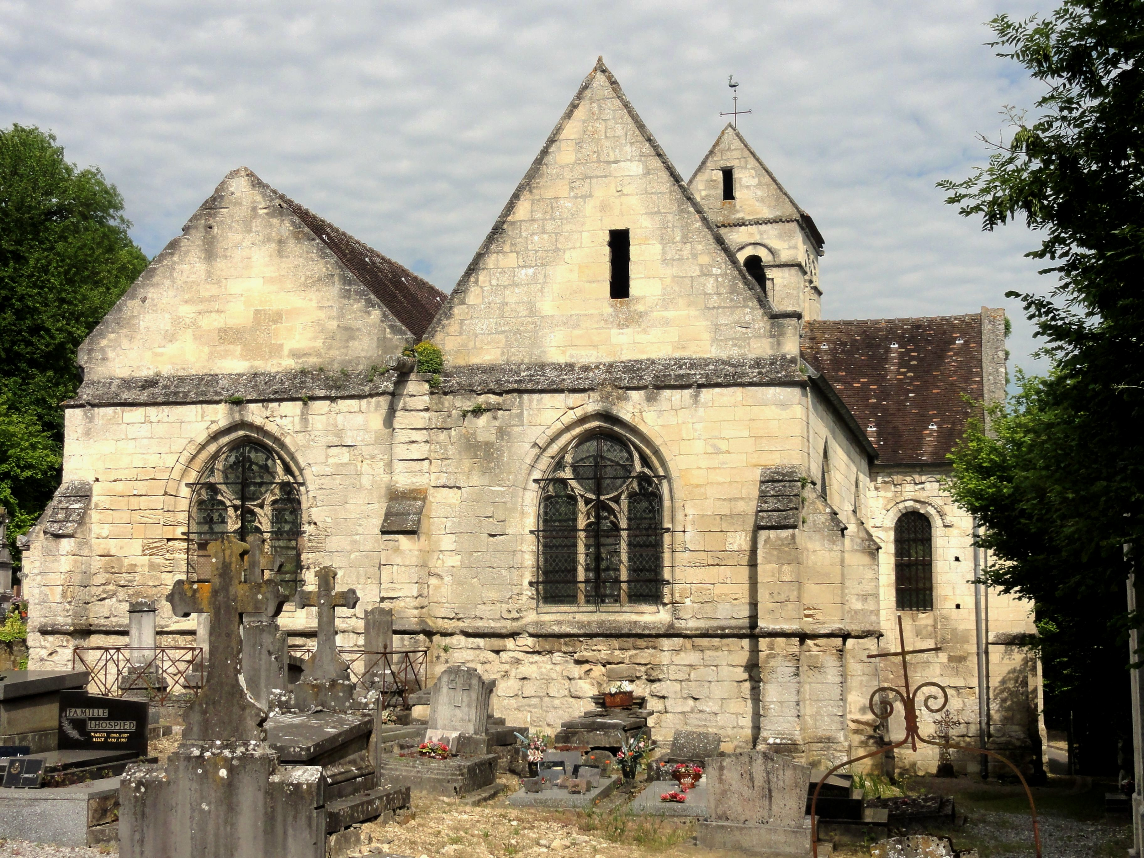 Chevet.